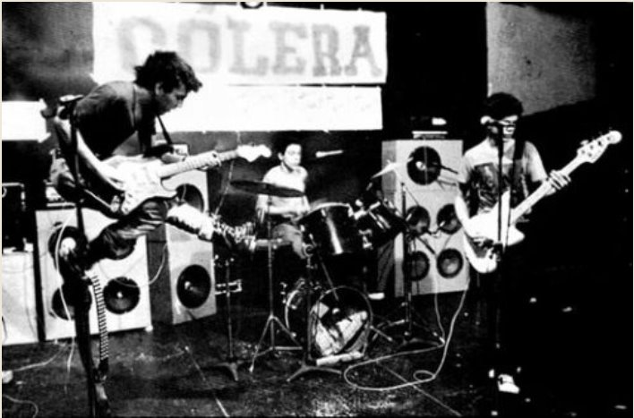 Cólera, uma das primeiras e mais importantes bandas punks do Brasil. Cólera ao vivo em São Paulo, Brasil, 1985.